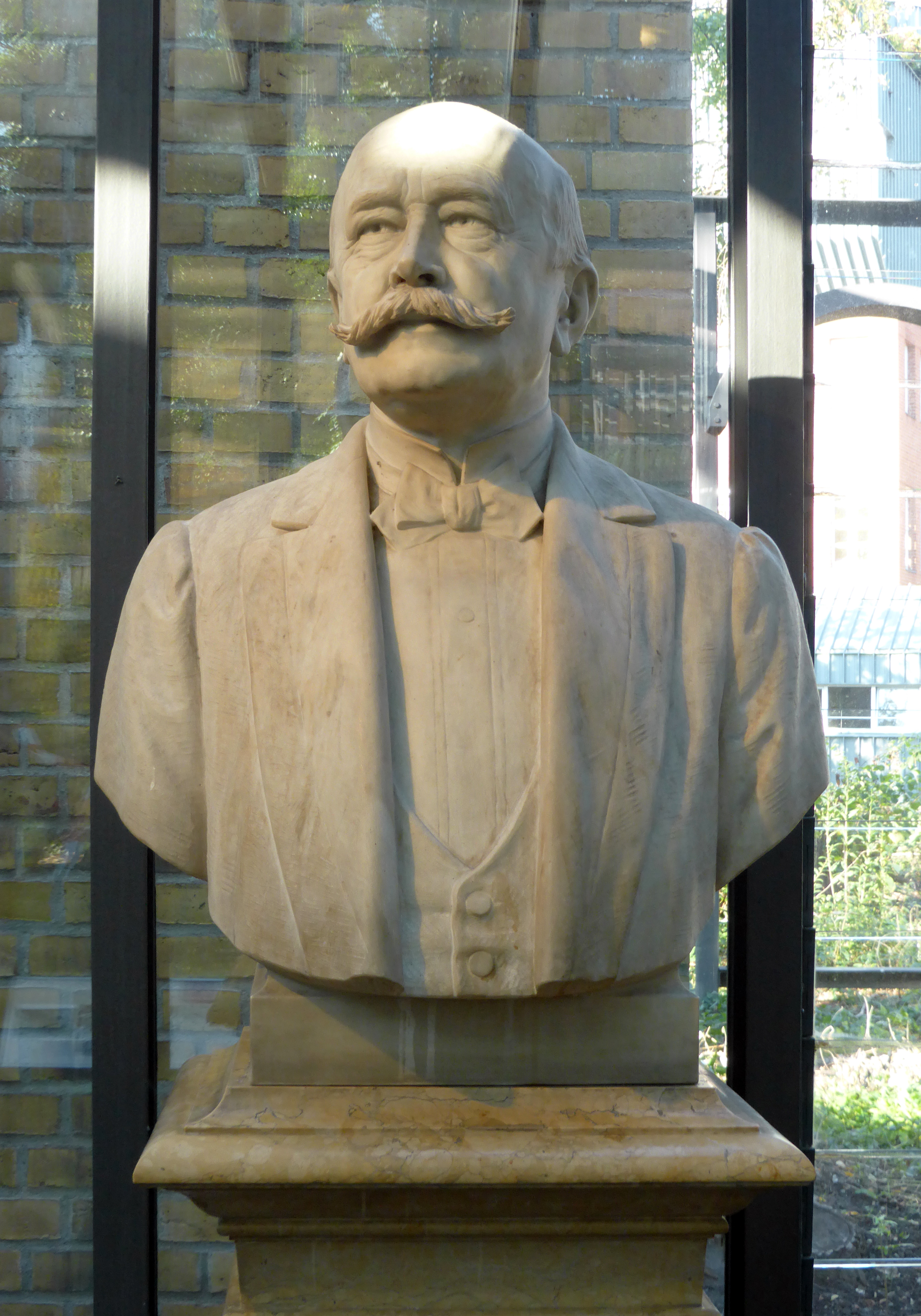 Marmorbüste Karl von Thielen vom Bildhauer Martin Götze von 1910. Ausgestellt im Deutschen Technikmuseum in Berlin. Inventarnummer: VBM E-B-5002. Wikipedianische KulTour am 10. Oktober 2015 in der Ausstellung des Museums.